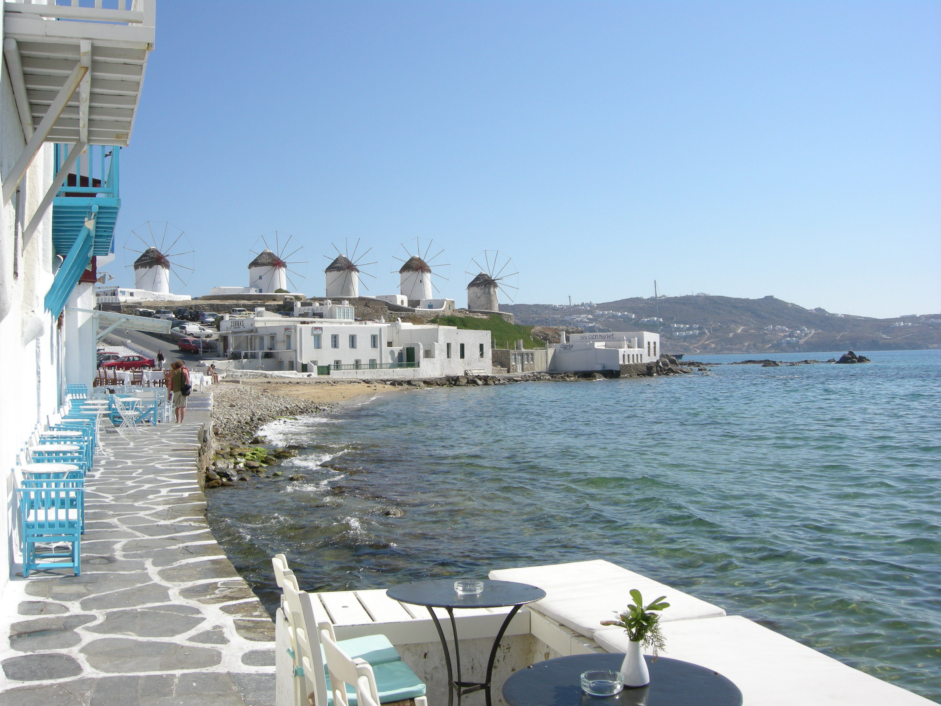 Mykonos, little venice